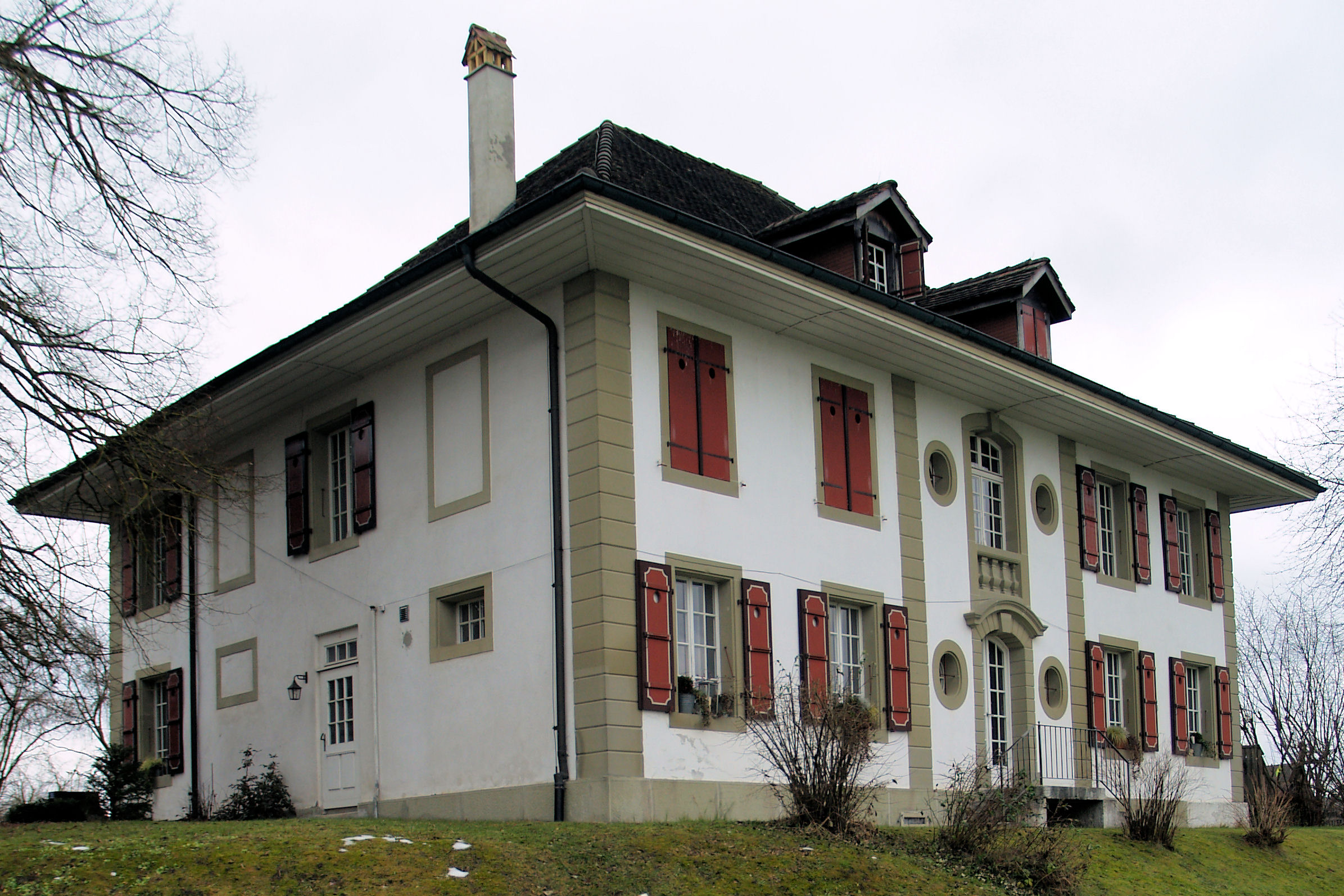 Pfarrhaus der Kirchegemeinde Grafenried-Fraubrunnen